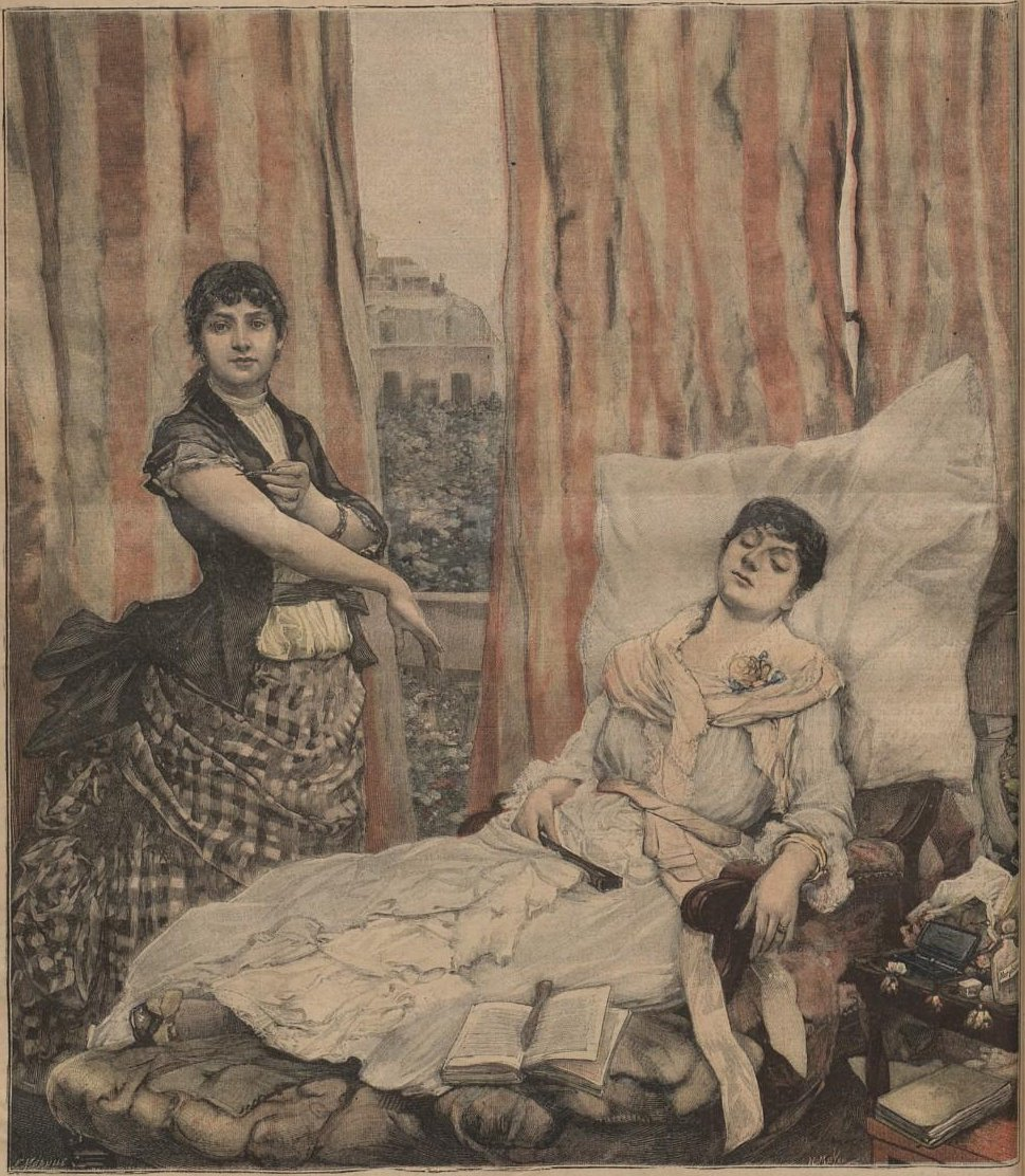 Les Morphinées